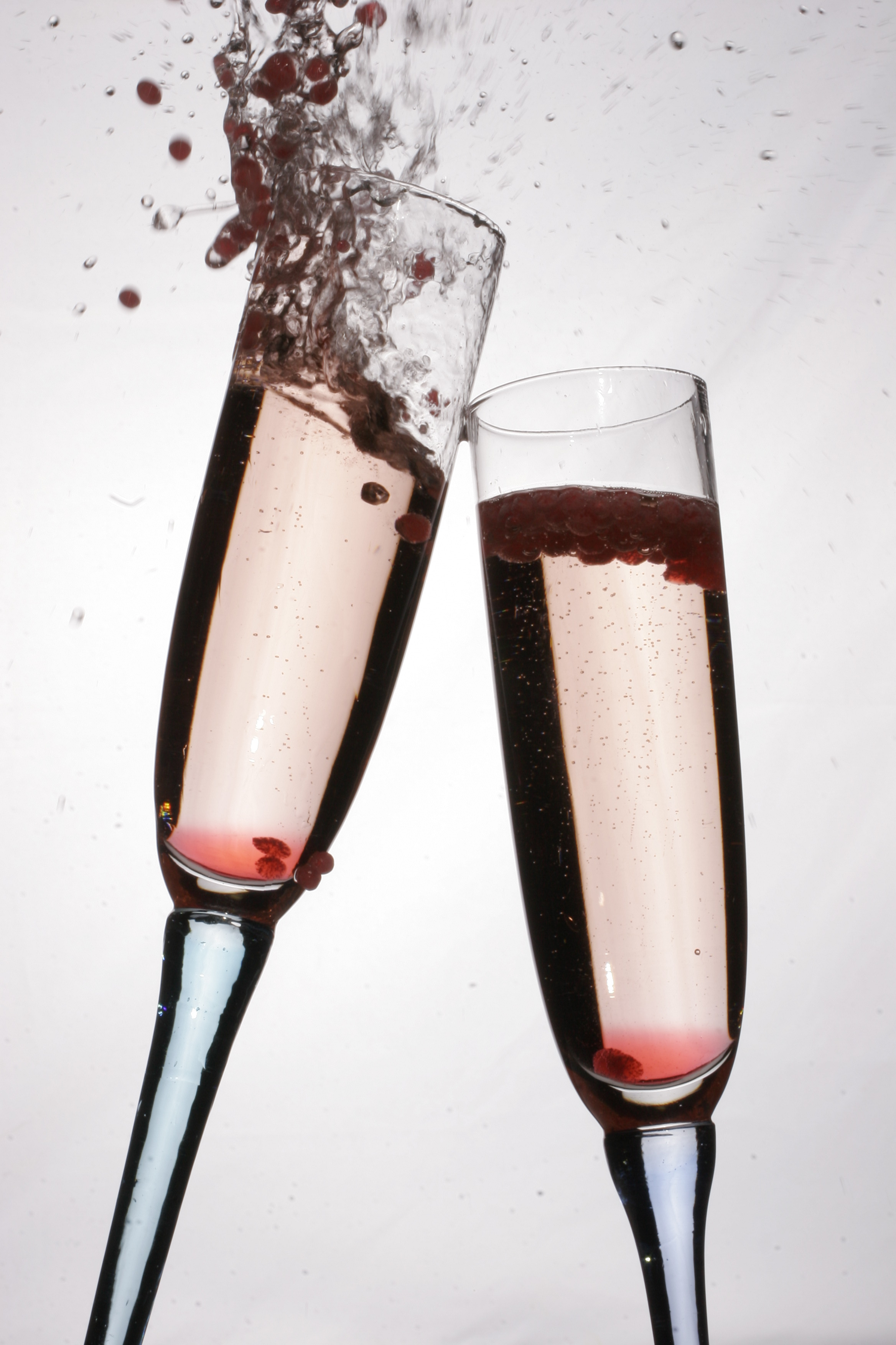 Alegoría de un brindis. Verres_comètes_fraise_lavande©.jpg